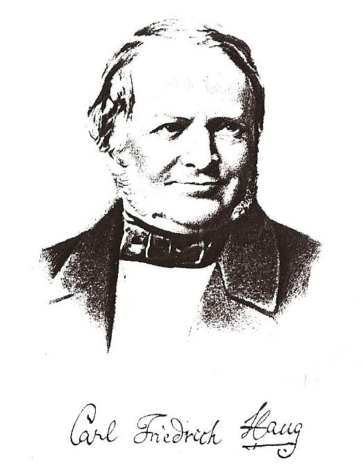 Fotografie und Unterschrift von Karl Friedrich Haug